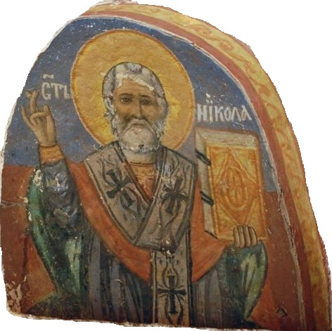 Фреска над влезниот дел на црквата „Св. Никола“ во битолски Метимир